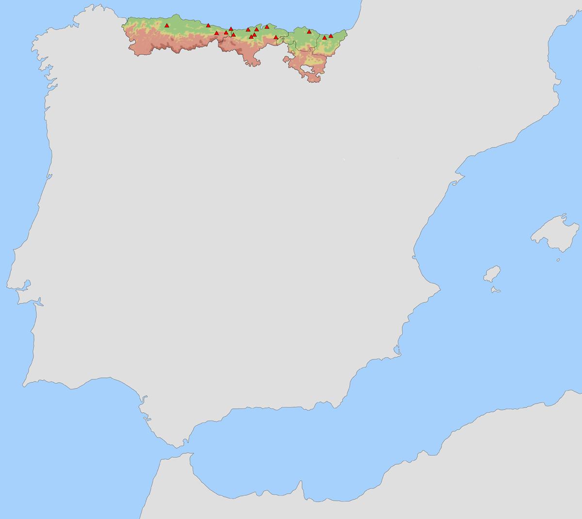 Situación de las cuevas con representaciones rupestres paleolíticas declaradas Patrimonio de la Humanidad como Cueva de Altamira y arte rupestre paleolítico del norte de España.